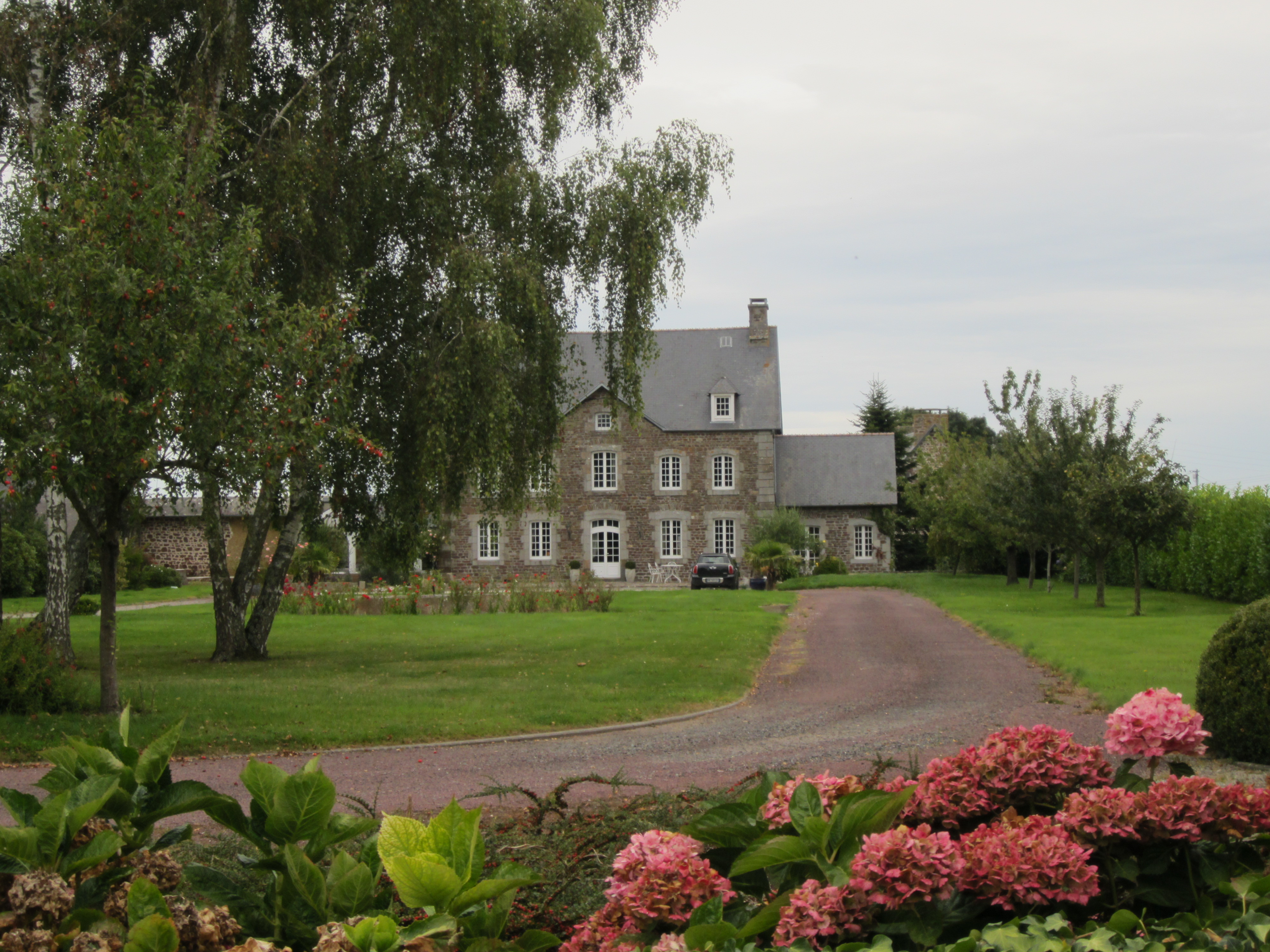 Anctoville-sur-Boscq, Manche